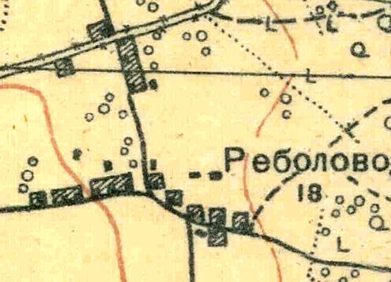 Топографическая карта Ленинградской области, квадрат О-35-24-Б-г (Б. Борницы), деревня Реболово